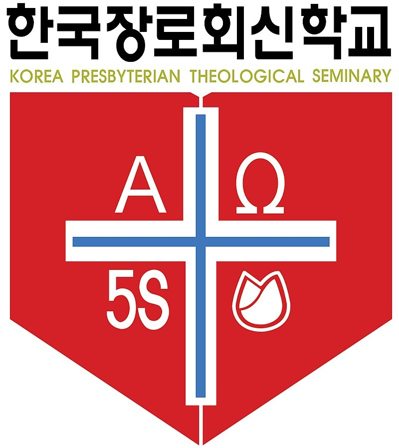 Korea Presbyterian Theological Seminary(KPTS)의 Symbol Mark & Logo입니다